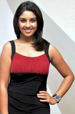 Richa Gangopadhyay